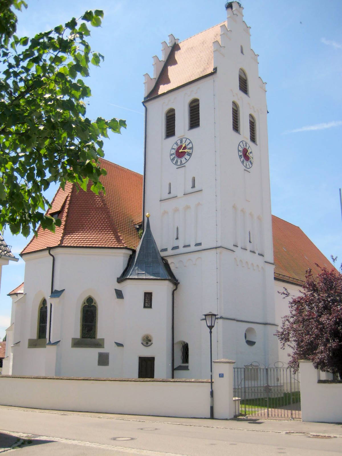 Geisenfeld liegt im Landkreis Pfattenhofen a.d. Ilm.